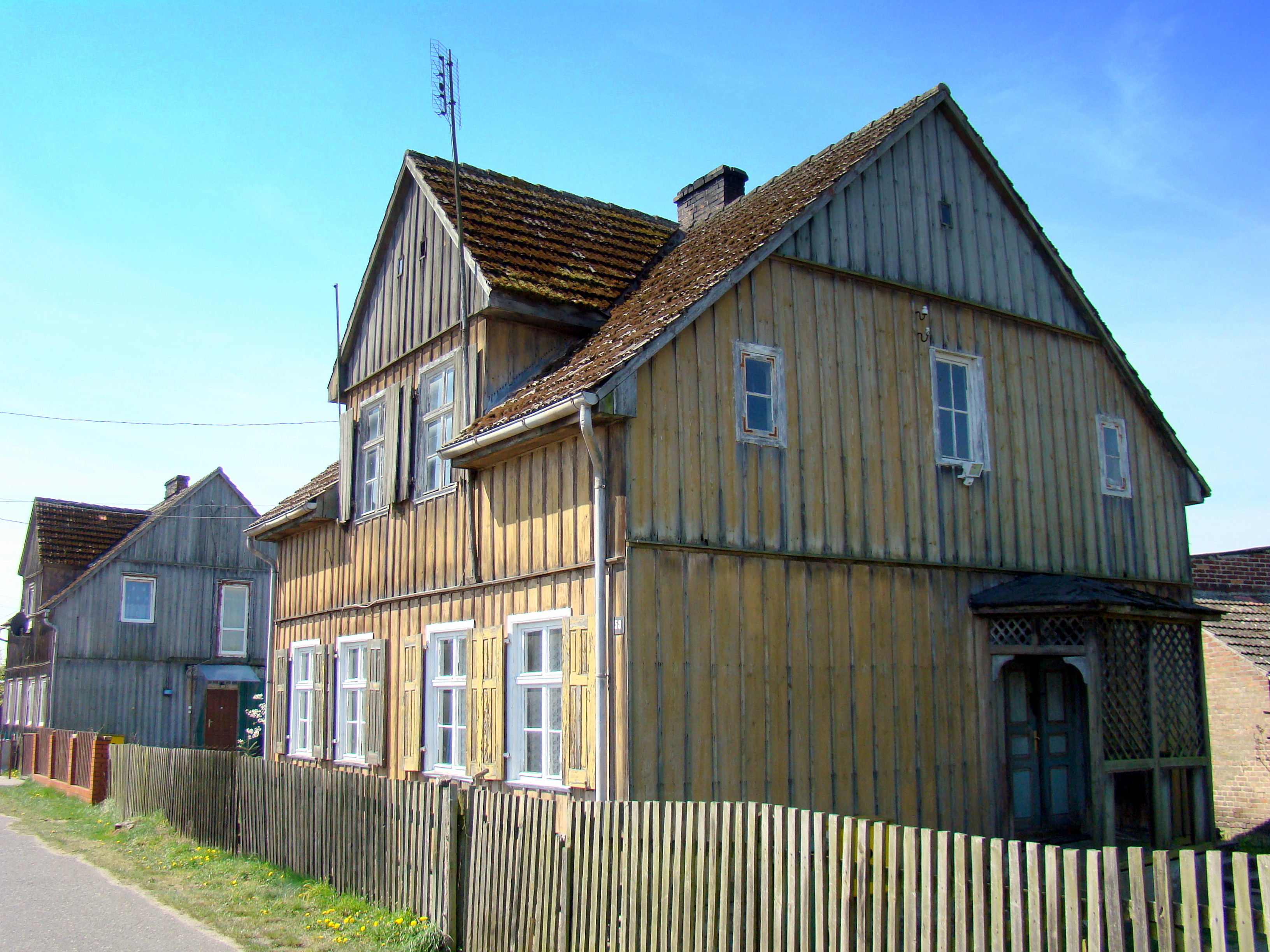 Drogoradz, (Gmina Police, Powiat policki, Województwo zachodniopomorskie), Polska